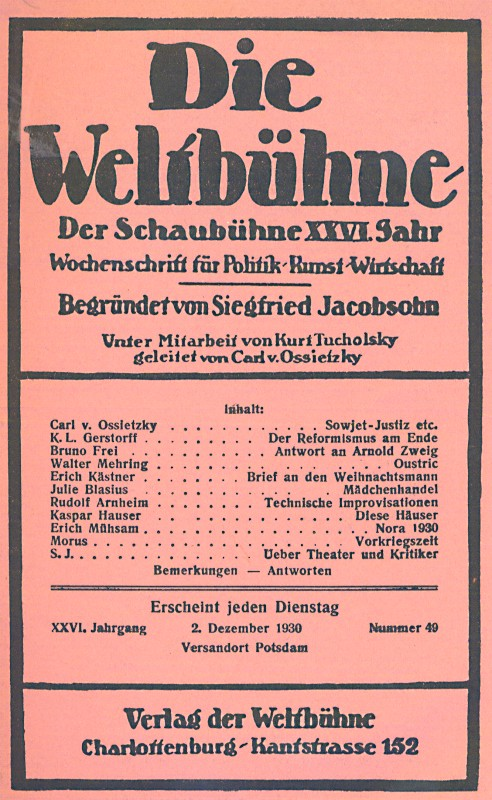 Cover der "Weltbühne" vom 2.12.1930